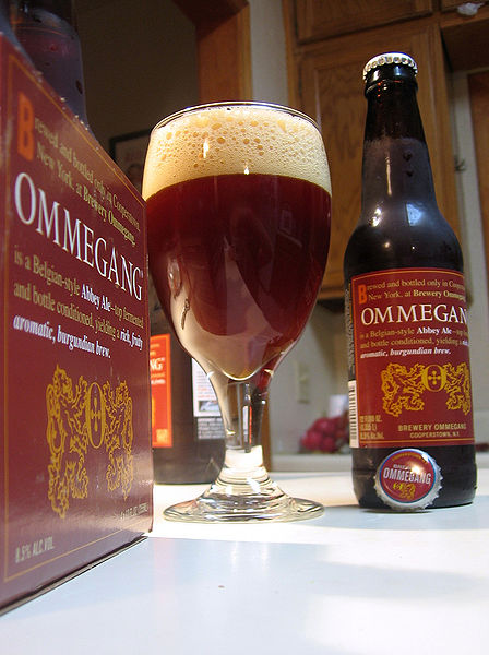 Lubbock - Ommegang Abbey Ale